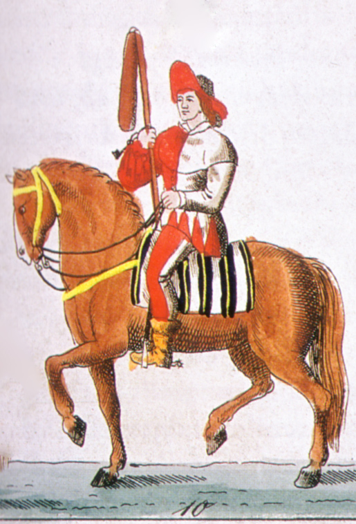 Maskenzug 1825 (2), einer der ersten Kölner Karnevalsumzüge, Ausschnitt Kölner Bauer